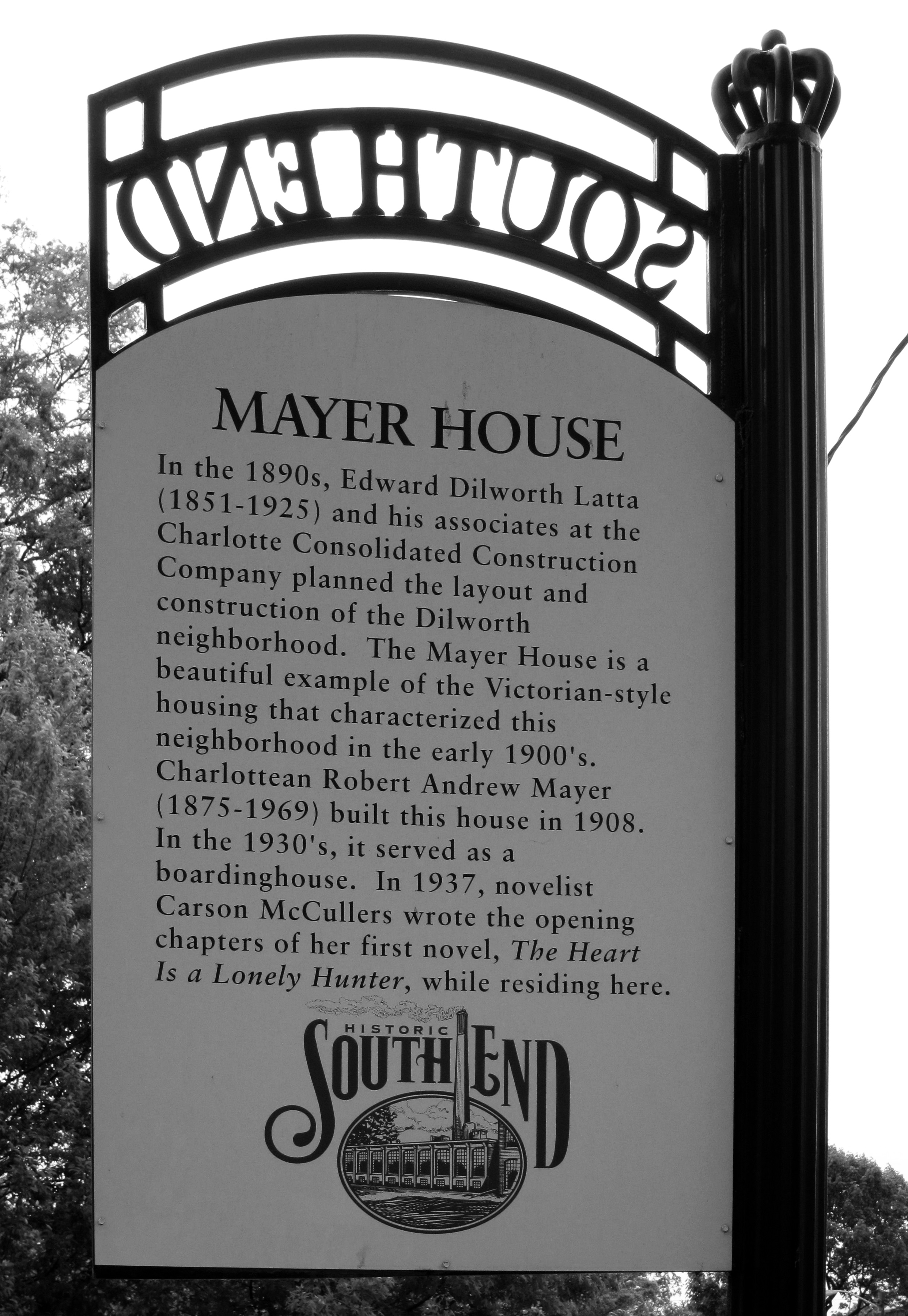 Schild am Mayer House in Charlotte, North Carolina, wo Carson MacCullers 1937 die ersten Kapitel von "The Heart is a Lonely Hunter" schrieb